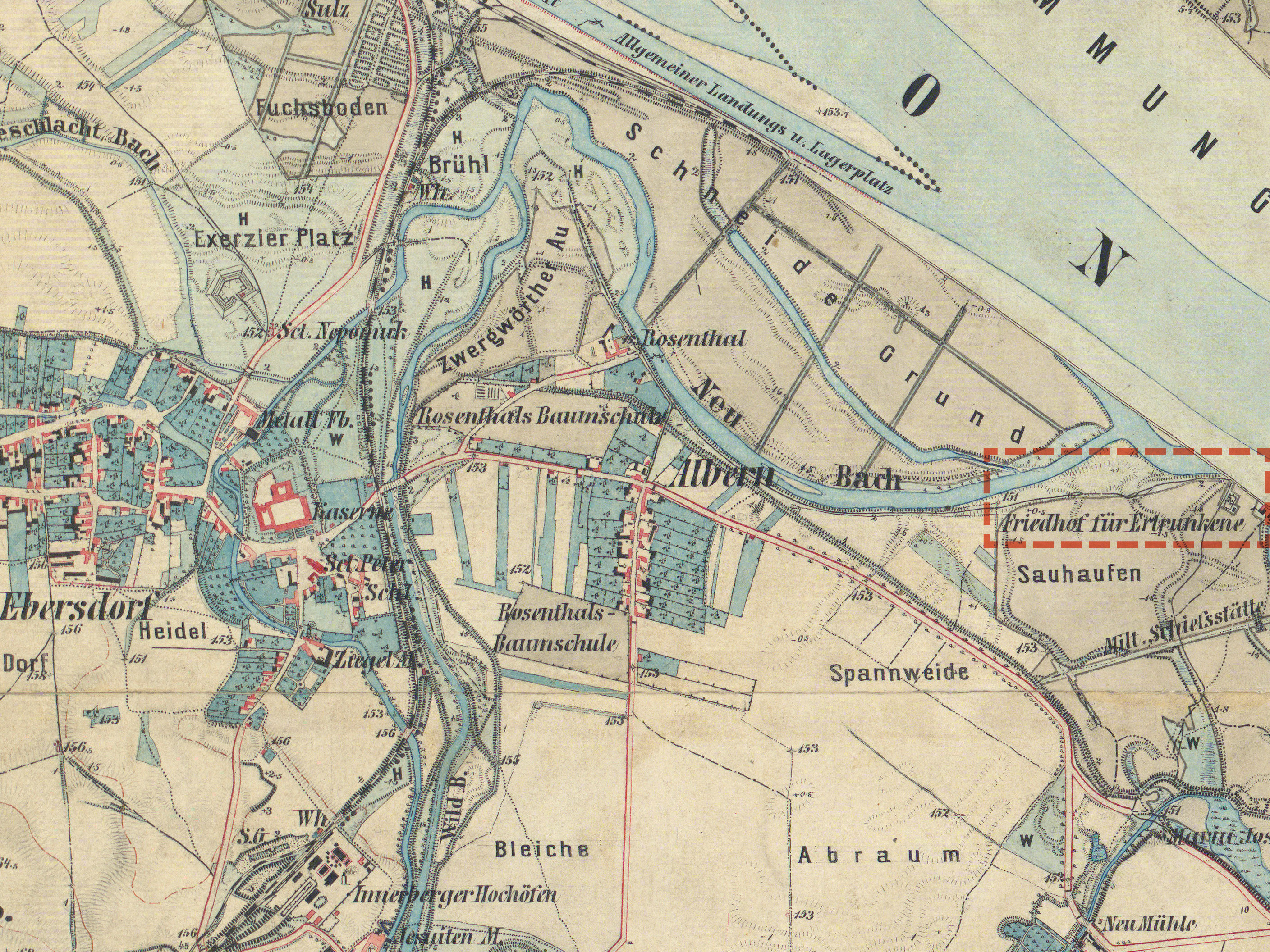 Wien-Albern. Lage des Friedhofs für Ertrunkene